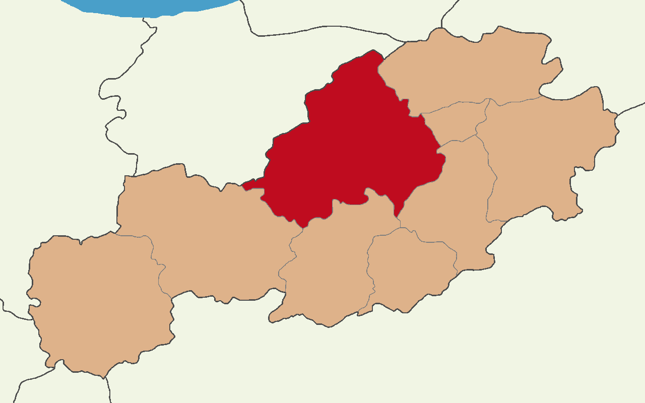 Bolu Merkez ilçesinin konumu